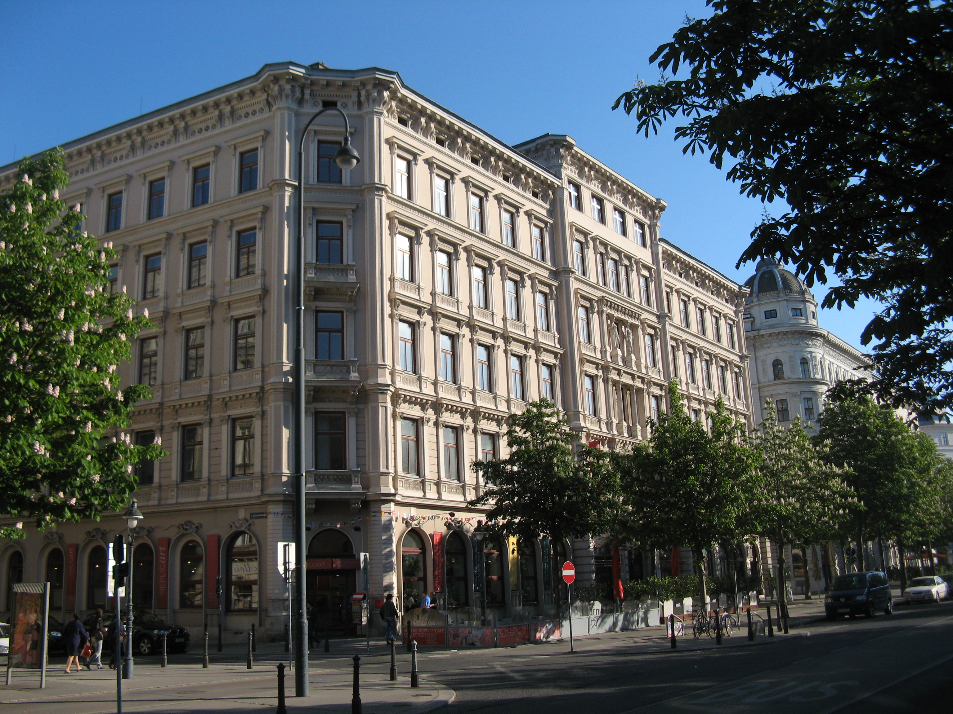 Wohnhaus (1864-65) von Carl Schumann, Babenbergerstraße 5, Wien-Innere Stadt